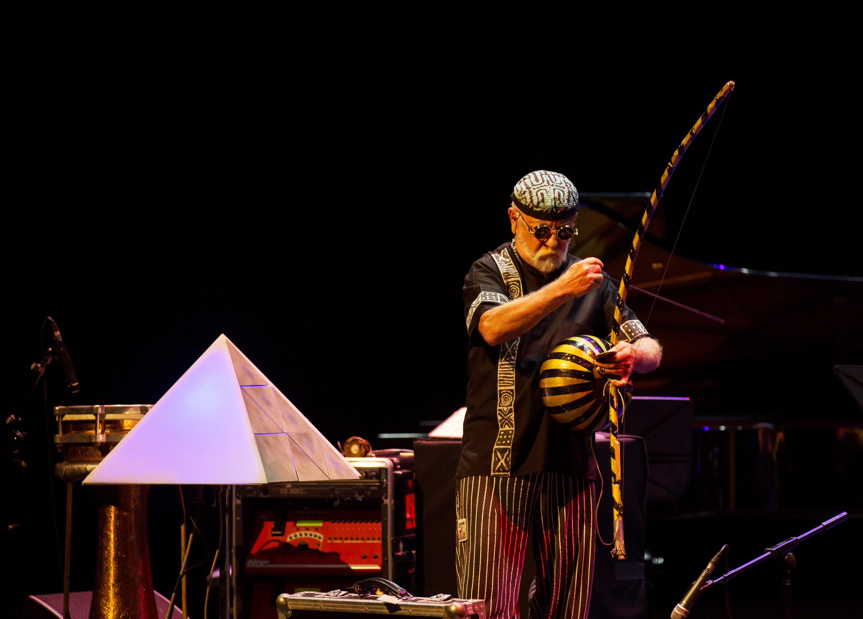 Caz müzisyeni